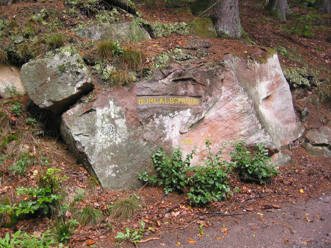 Ritterstein Nummer 101, Burgalbsprung